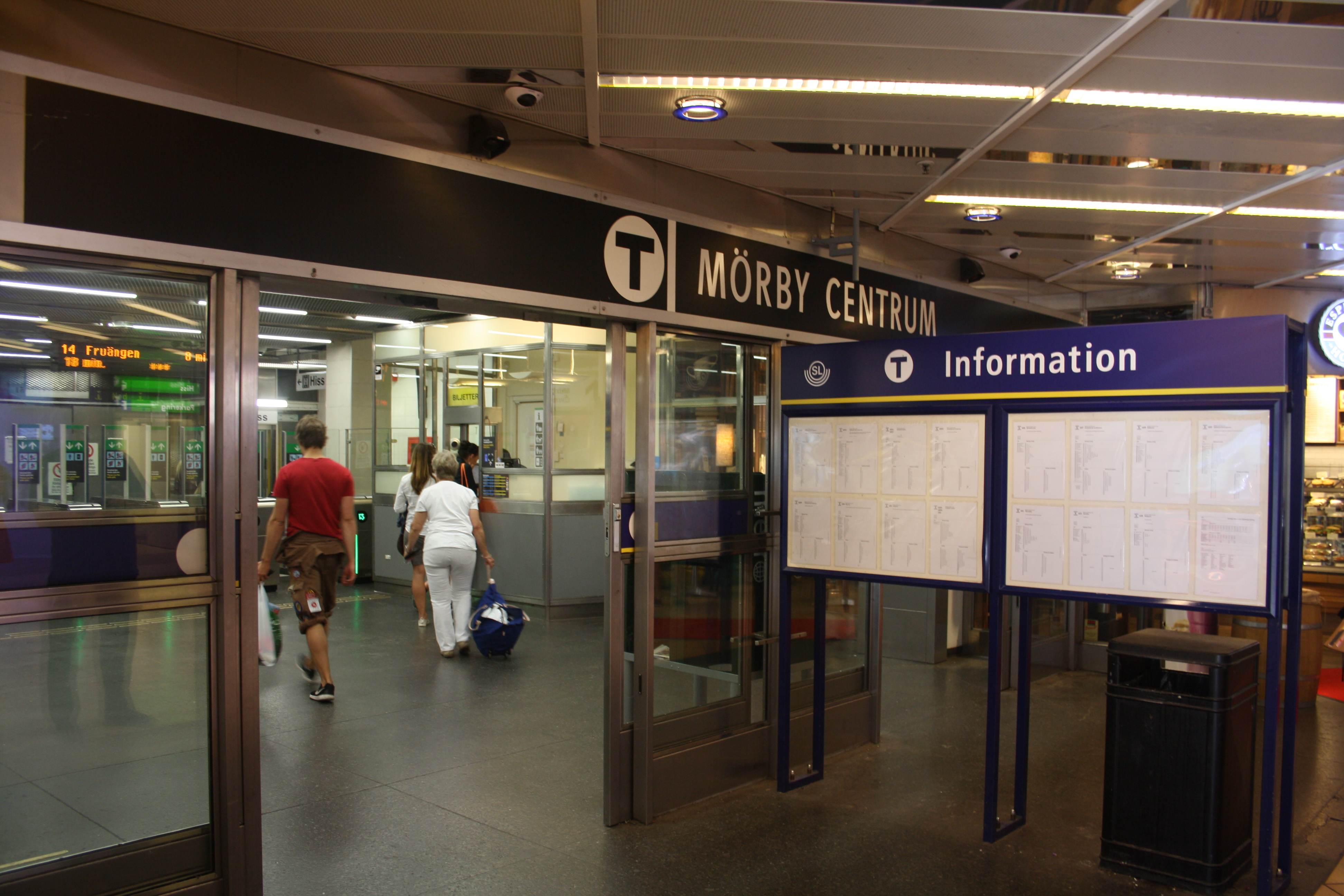 Mörby centrum tunnelbana augusti 2016